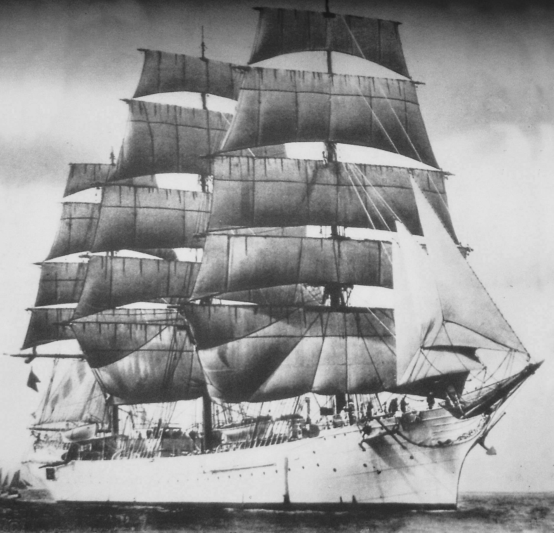 af Chapman